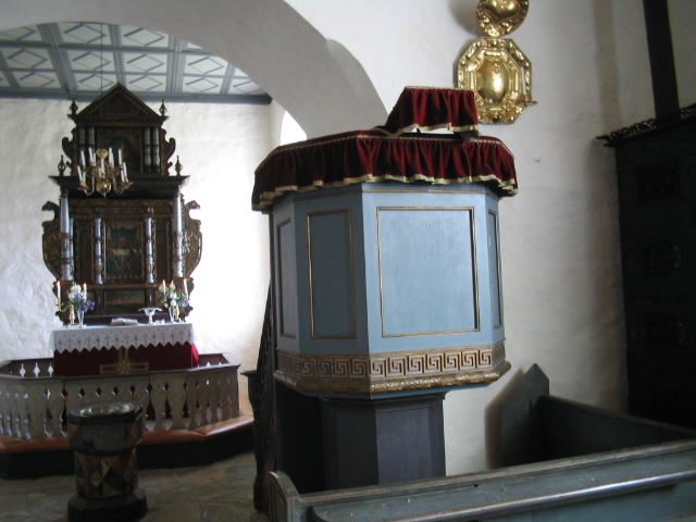 Talerstol, Skoger gamle kirke, Drammen